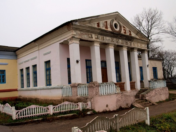 Беларуская (тарашкевіца): Царква ў імя Пакрова Прасьвятой Багародзіцы. в. Межава This is a photo of Belarusian heritage monument. Reference number: 213Г000135 ( WLM)